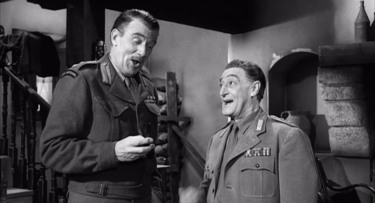 I due colonnelli Licensing Categoria:Immagini di Antonio De Curtis